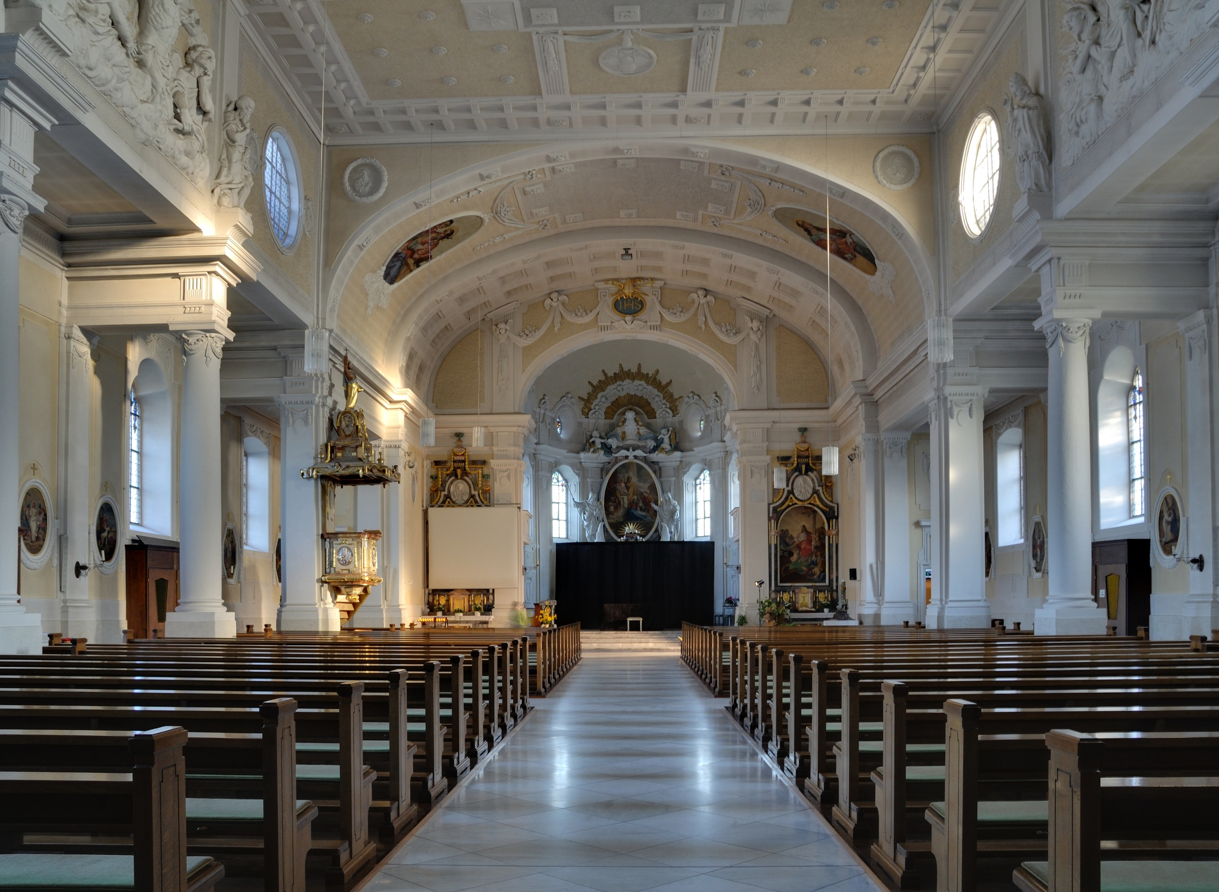 Rheinfelden: St. Josef, Langhaus mit Blick zum Chor